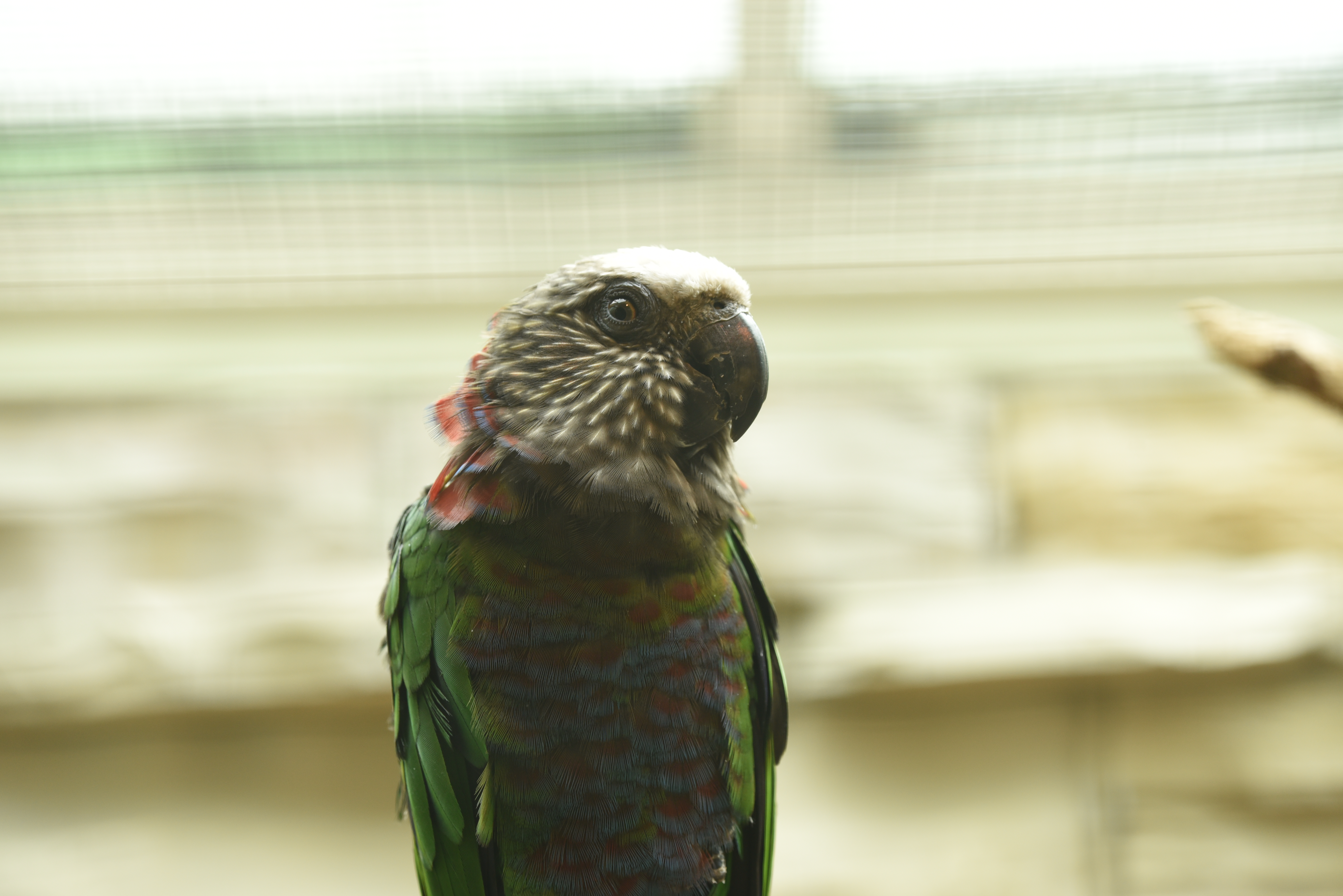 Dunkelstirniger Fächerpapagei (Deroptyus accipitrinus accipitrinus), Aufnahme des Bildes im Vogelpark Walsrode